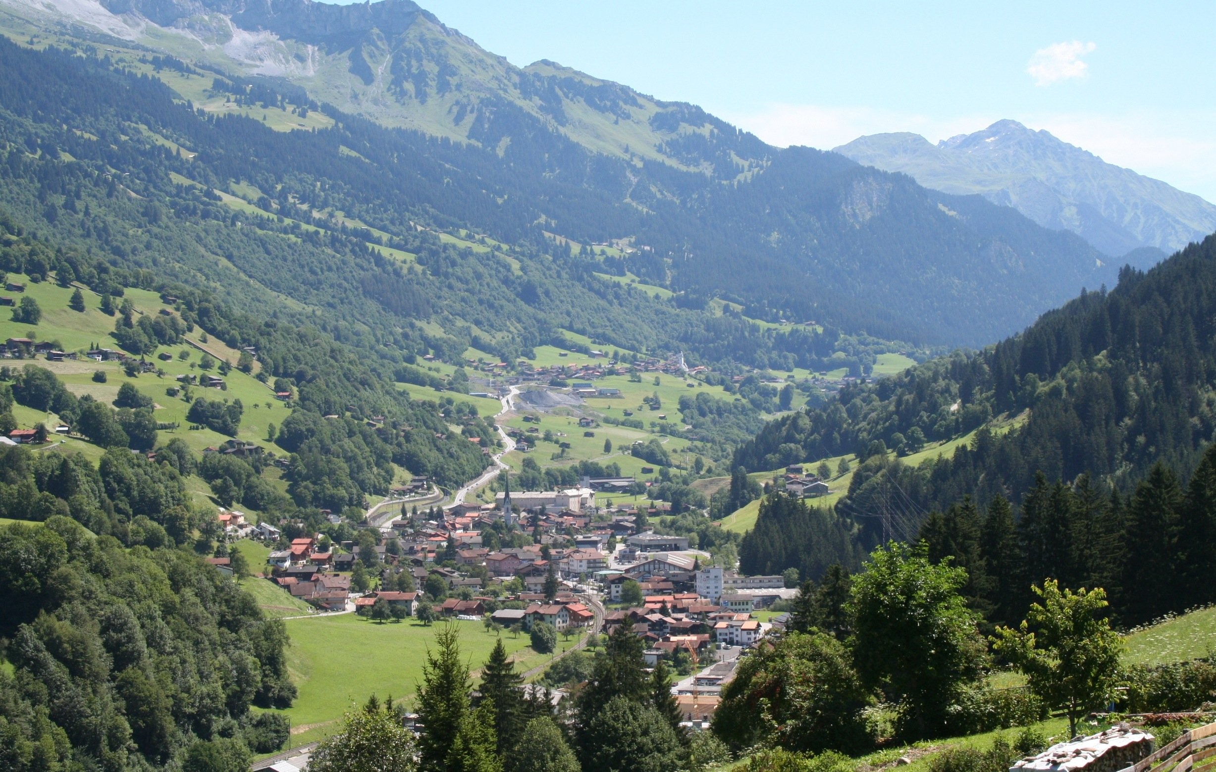 Küblis, Blick nach Süden